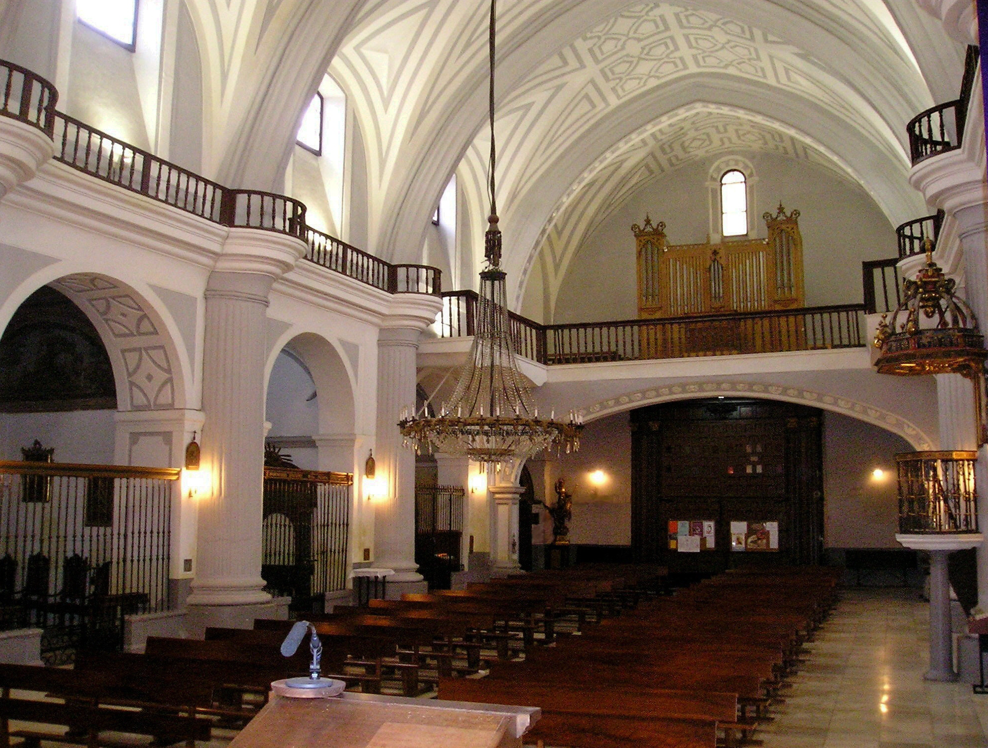 Iglesia de El Salvador de Valladolid. Interior hacia los pies. Se puede ver el coro alto, el órgano y la disposición de la nave.